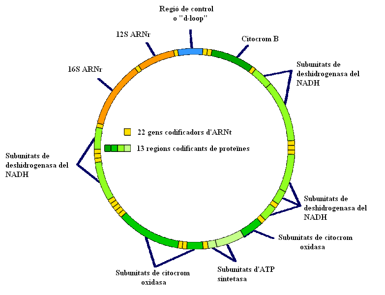 ADN mitocondrial